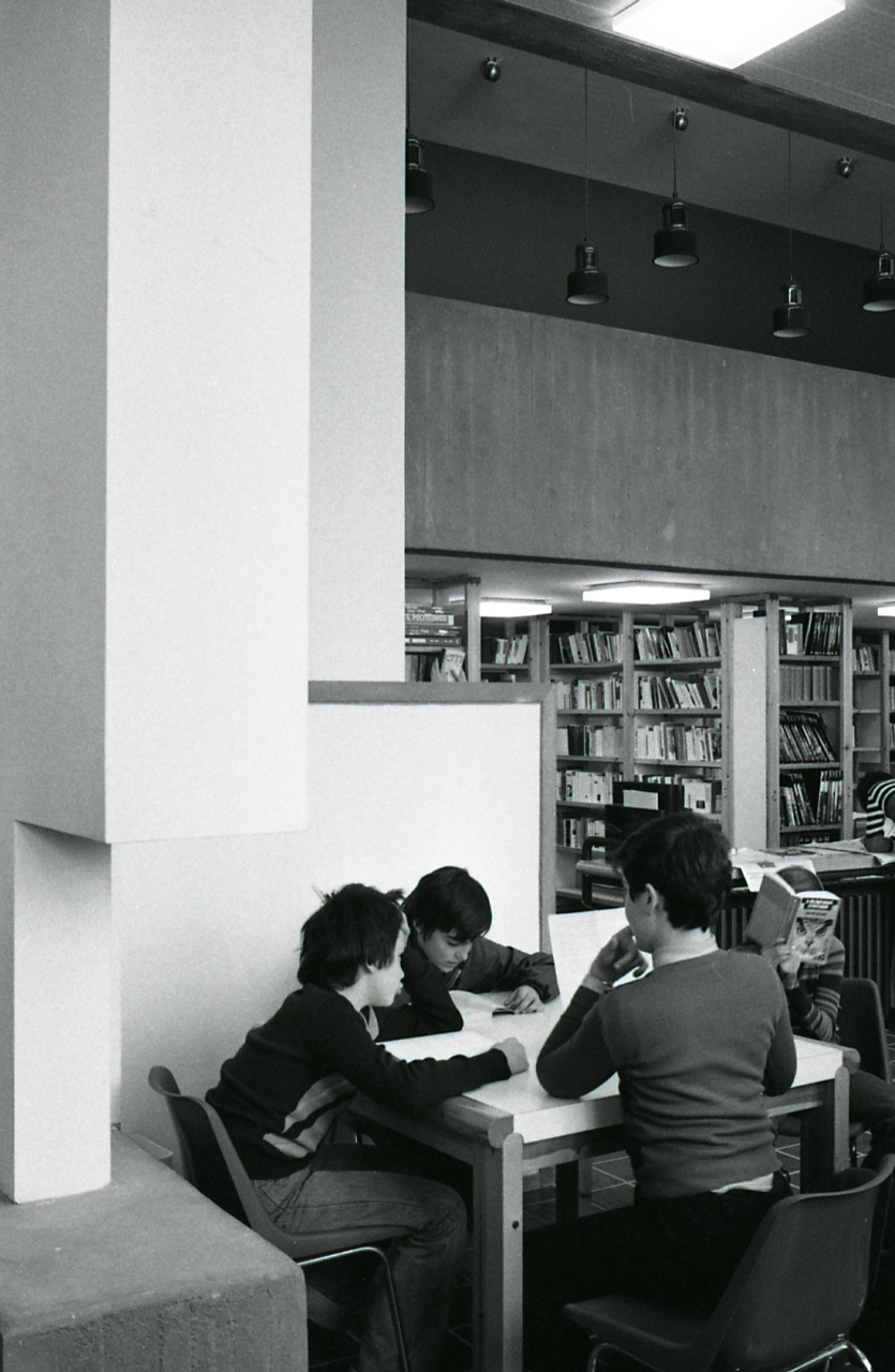 Servizio fotografico : Casalecchio di Reno, 1976 / Paolo Monti. - Strisce: 6, Fotogrammi complessivi: 23 : Negativo b/n, gelatina bromuro d'argento/ pellicola ; 35 mm. - ((Sul portanegativi: NIK[MAT] 2 Tri-X. - Occasione: Documentazione della nuova biblioteca. - Fonte: Agenda di Paolo Monti: Leica 1501-3000 Controllo numerazione (1950-1978), presso Archivio Paolo Monti. - Fonte: Fattura di Paolo Monti: IV. Commesse/ Fattura n. 10/ Nuova biblioteca Casalecchio di Reno (1976/07/06), presso Archivio Paolo Monti